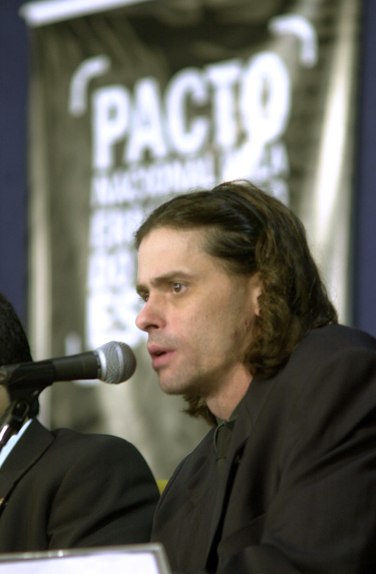 Ator Marcos Winter fala no lançamento do Pacto Nacional pela Erradicação do Trabalho Escravo, pela Organização Internacional do Trabalho (OIT) e o Instituto Ethos.